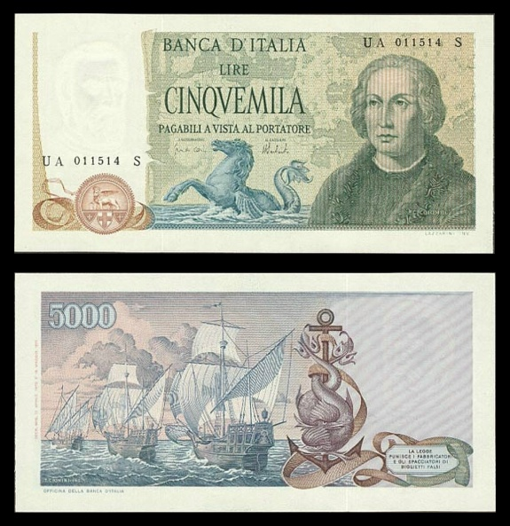 £ 5.000 (Cristoforo Colombo, 2° tipo)